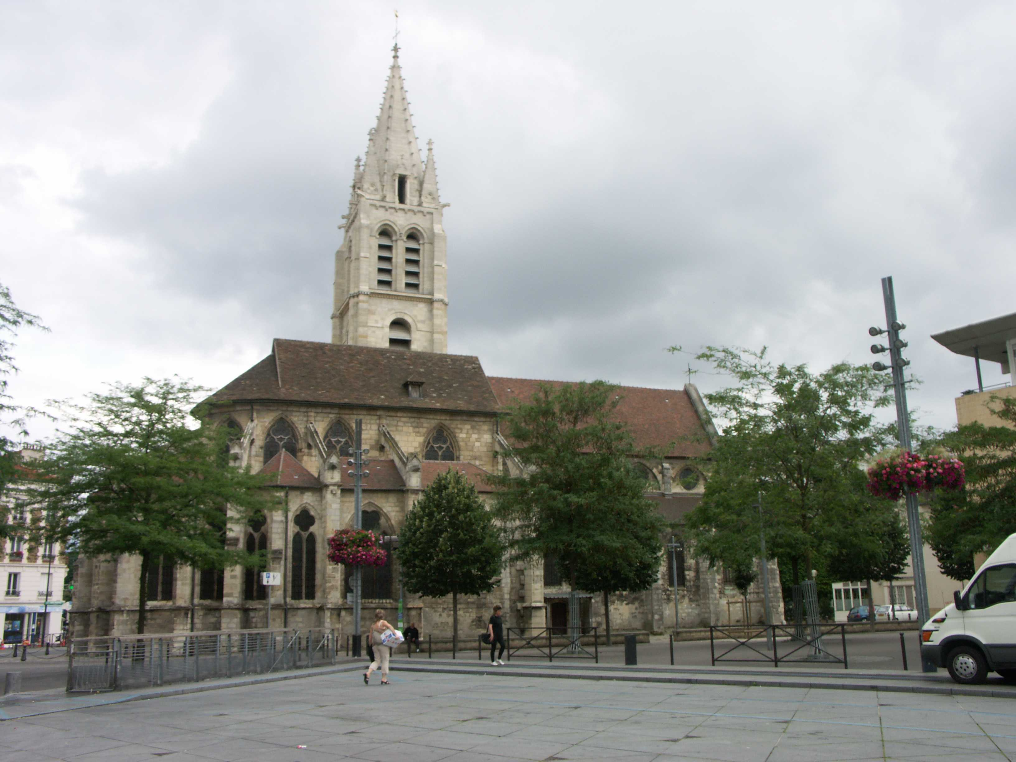 Vitry sur Seine - Eglise St Germain vue depuis la place du Marché